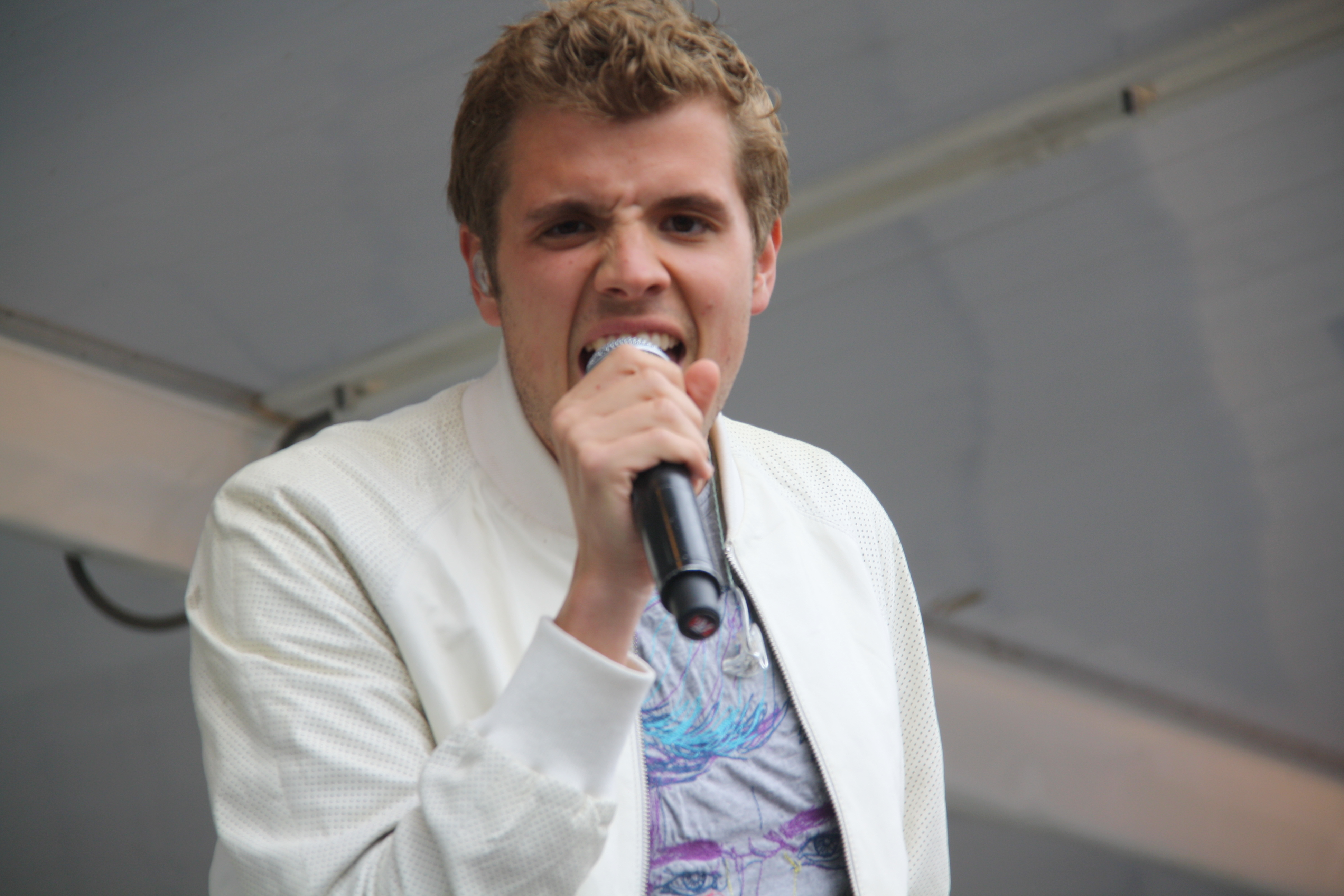 Jaap Siewertsz van Reesema (Deventer, 28 oktober 1984) is een Nederlandse zanger. Jaap Reesema op de TT-Kermis in Assen